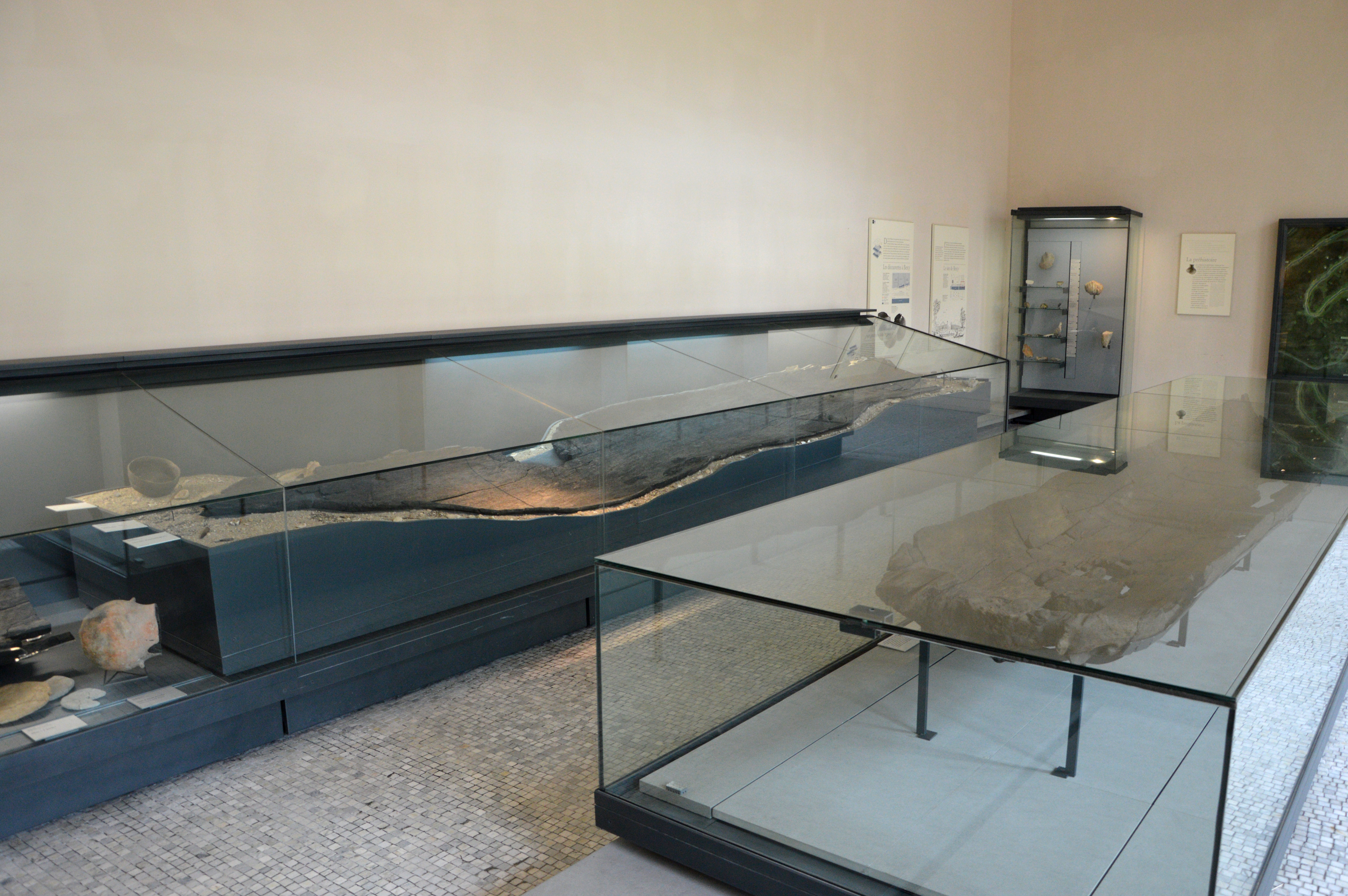 Pirogues monoxyle P03 et P06. Matériau : Chêne. Lieu de découverte : ZAC BERCY (Paris). Date de découverte en : 1991-1992. Date d'acquisition : 2000. Inv : CARBERCYP03 et CARBERCYP06